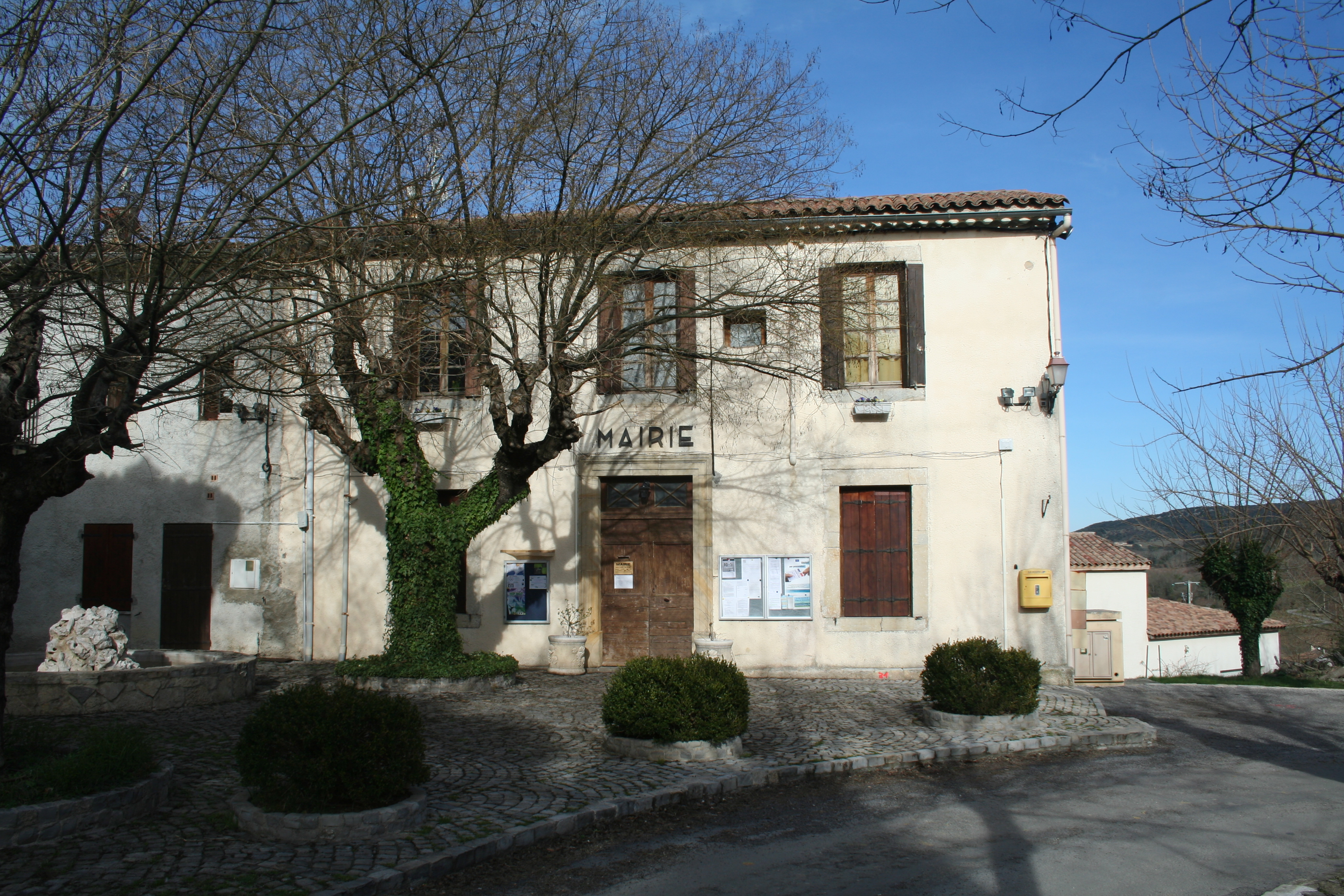 Montoulieu (Hérault) - mairie